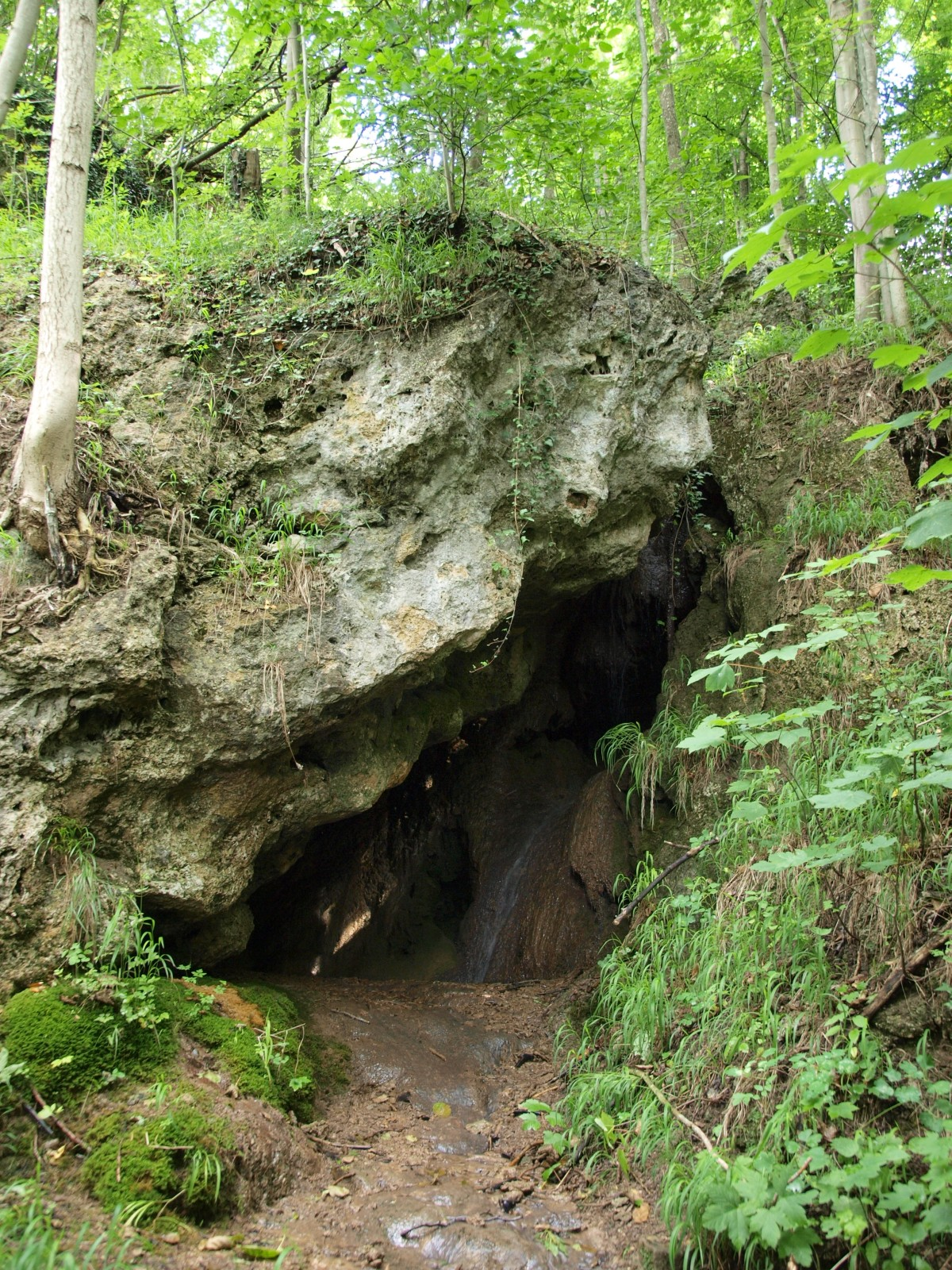 Huwelslay, kleine Tropfsteinhöhle zwischen Holsthum und Peffingen in der Eifel